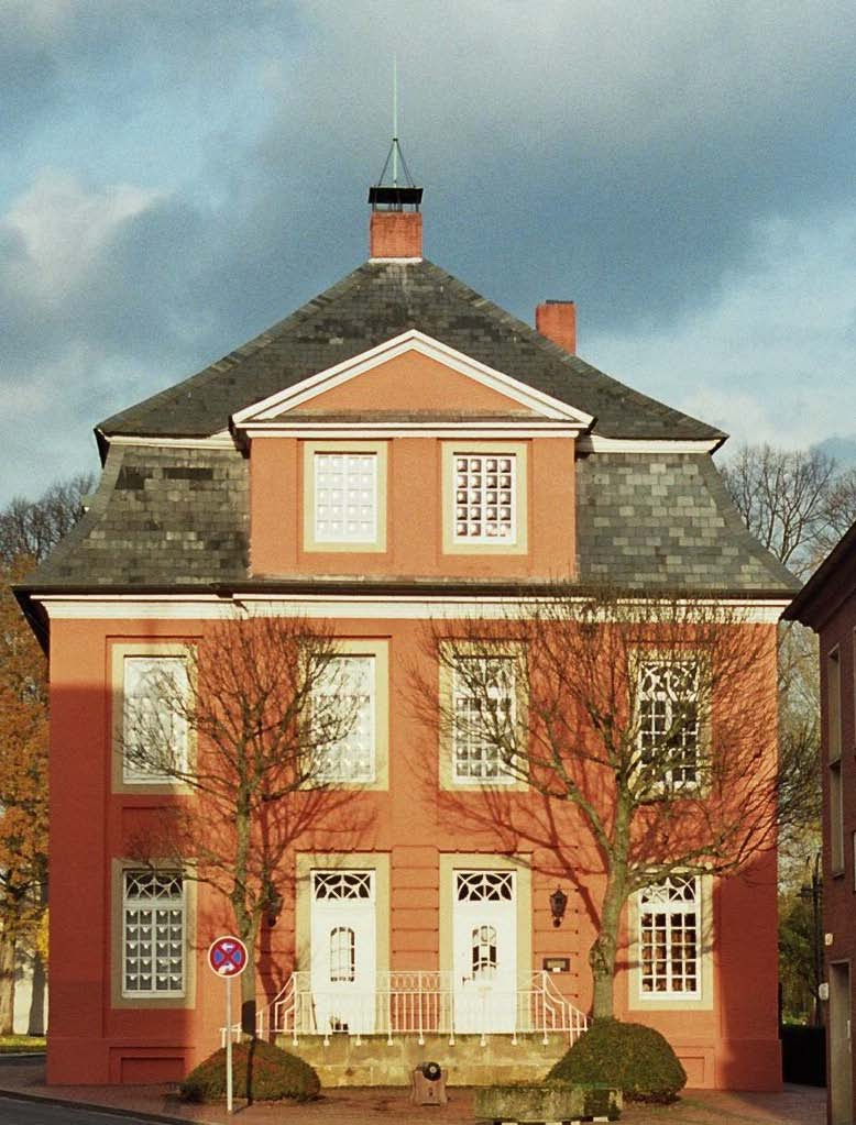 Arenbergische_Rentei in Meppen, beherbergt heute das Stadtmuseum